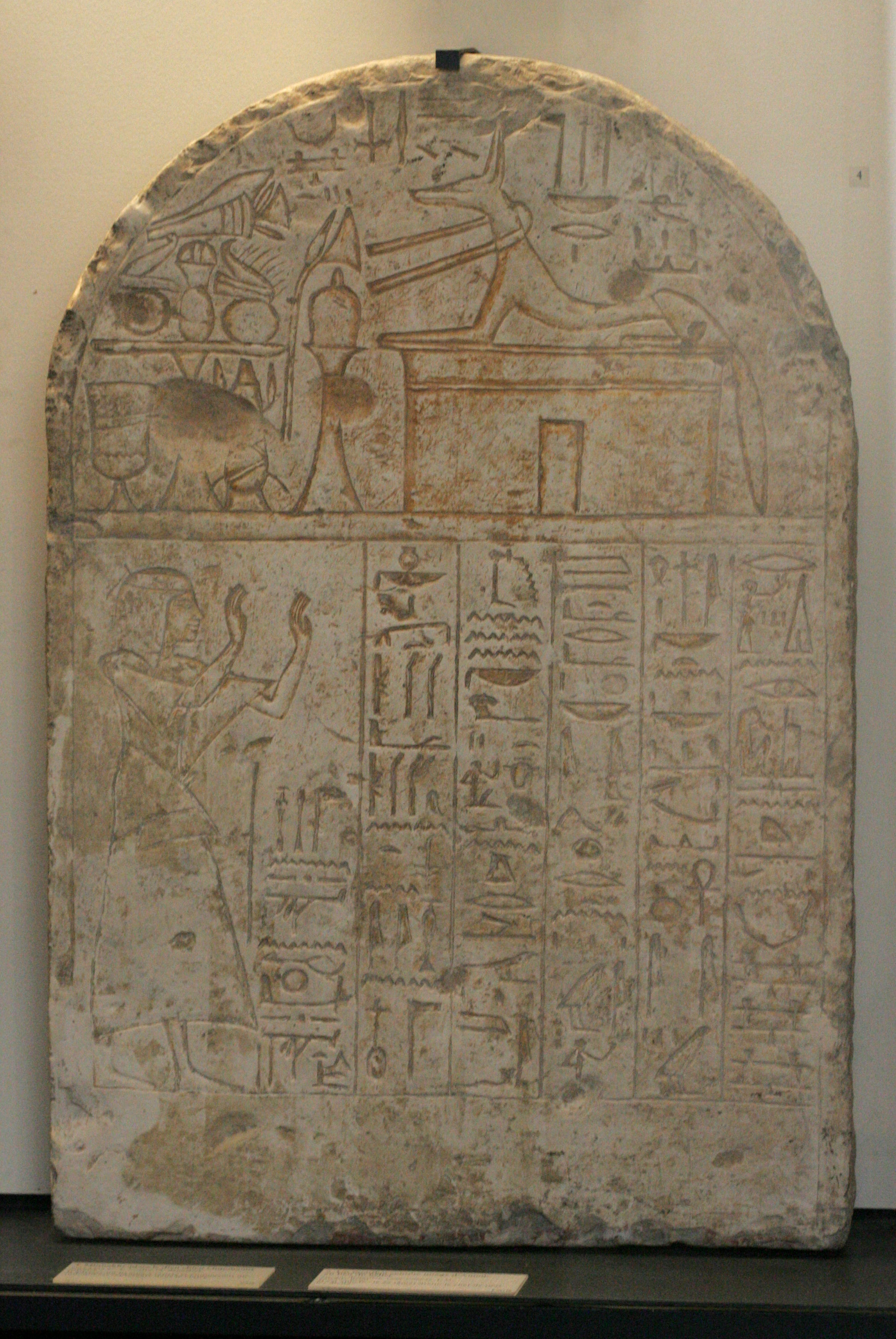 ArtistUnknownDescription Minnakht worshiping Oupouaout Current location Louvre Museum (Inventory)Native nameMusée du LouvreParent institutionÉtablissement public du musée du LouvreLocationParisCoordinates48° 51′ 37.42″ N, 2° 20′ 15.36″ E Established1793Web page control : Q19675 VIAF: 257711507 ISNI: 0000 0001 2260 177X ULAN: 500125189 LCCN: n80020283 NLA: 35912436 WorldCat Sully Rez-de-chaussée Les animaux et les dieux Salle 19Accession numberC1215ReferencesLouvre.frSource/PhotographerRama Minnakht worshiping Oupouaout